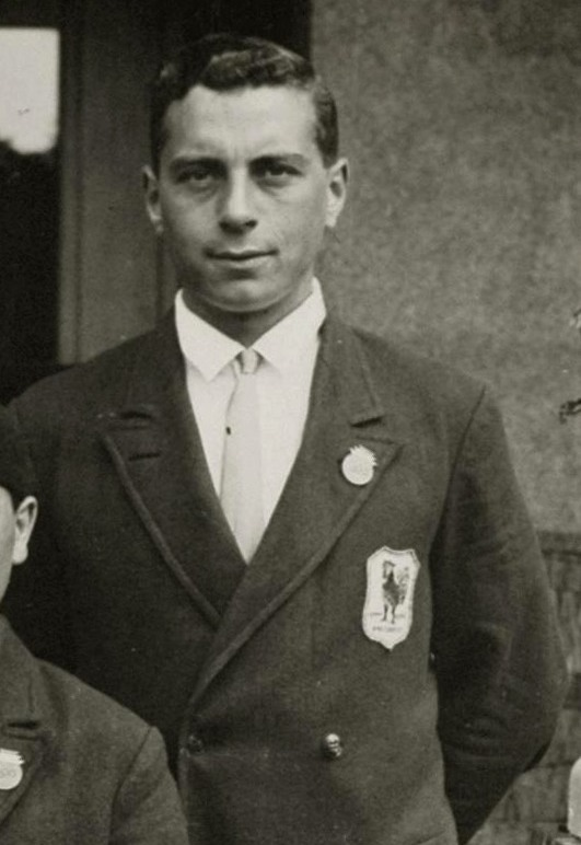 Olympische Spelen Amsterdam, Nederland, 1928: Roeien, twee met stuurman. Het Franse team poseert: A. Marcelle, E. Marcelle en H. Préaux